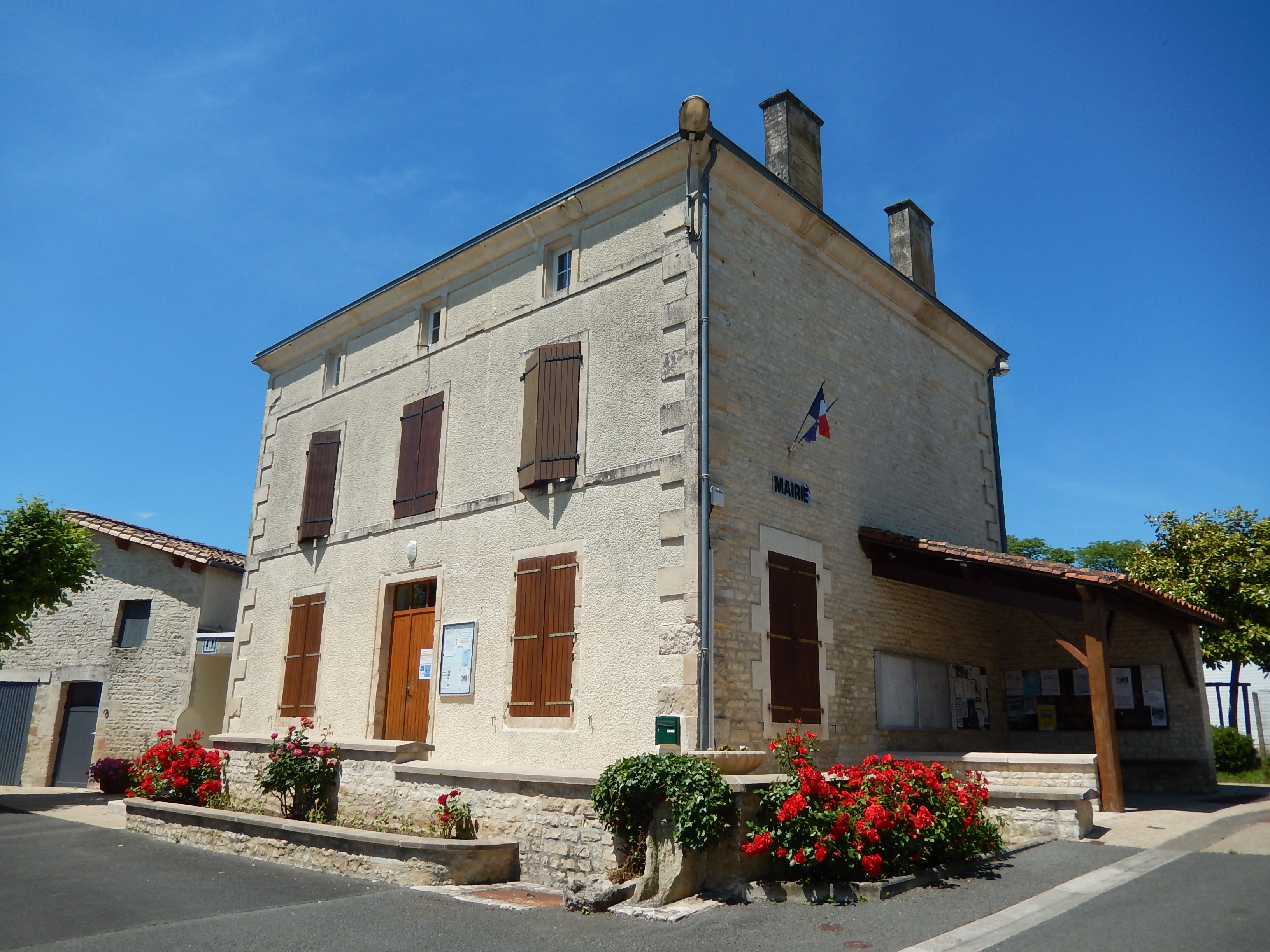 La mairie de la commune de Couture d'Argenson, dans les Deux-Sèvres.